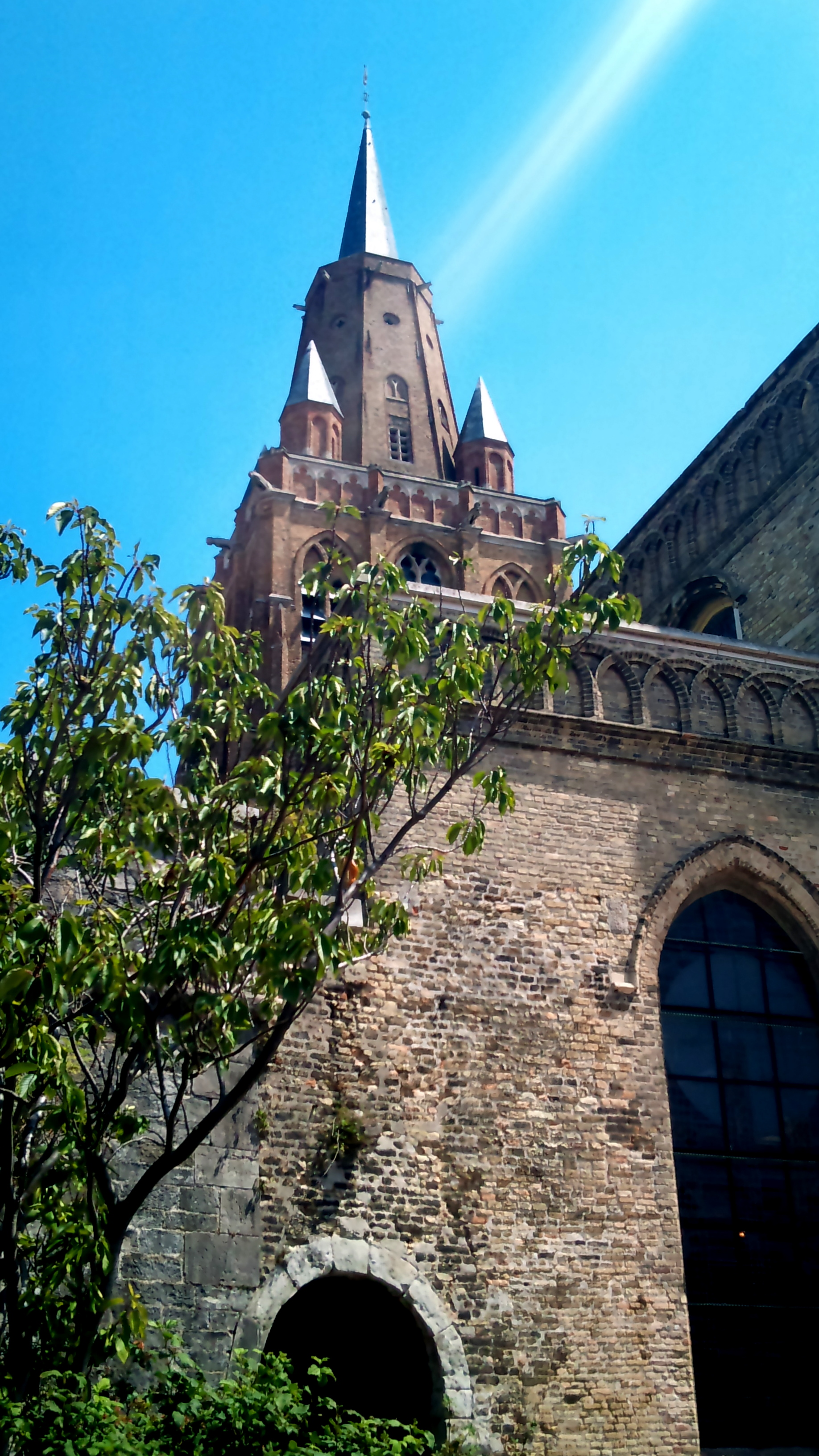 Calais - Eglise Notre-Dame fléche